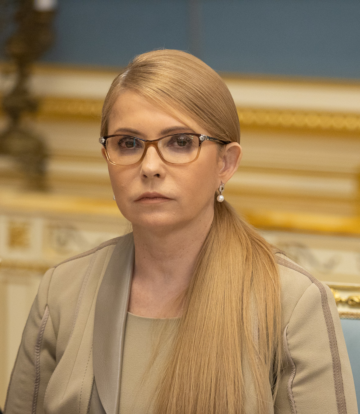 Встреча Зеленского с руководством ВРУ